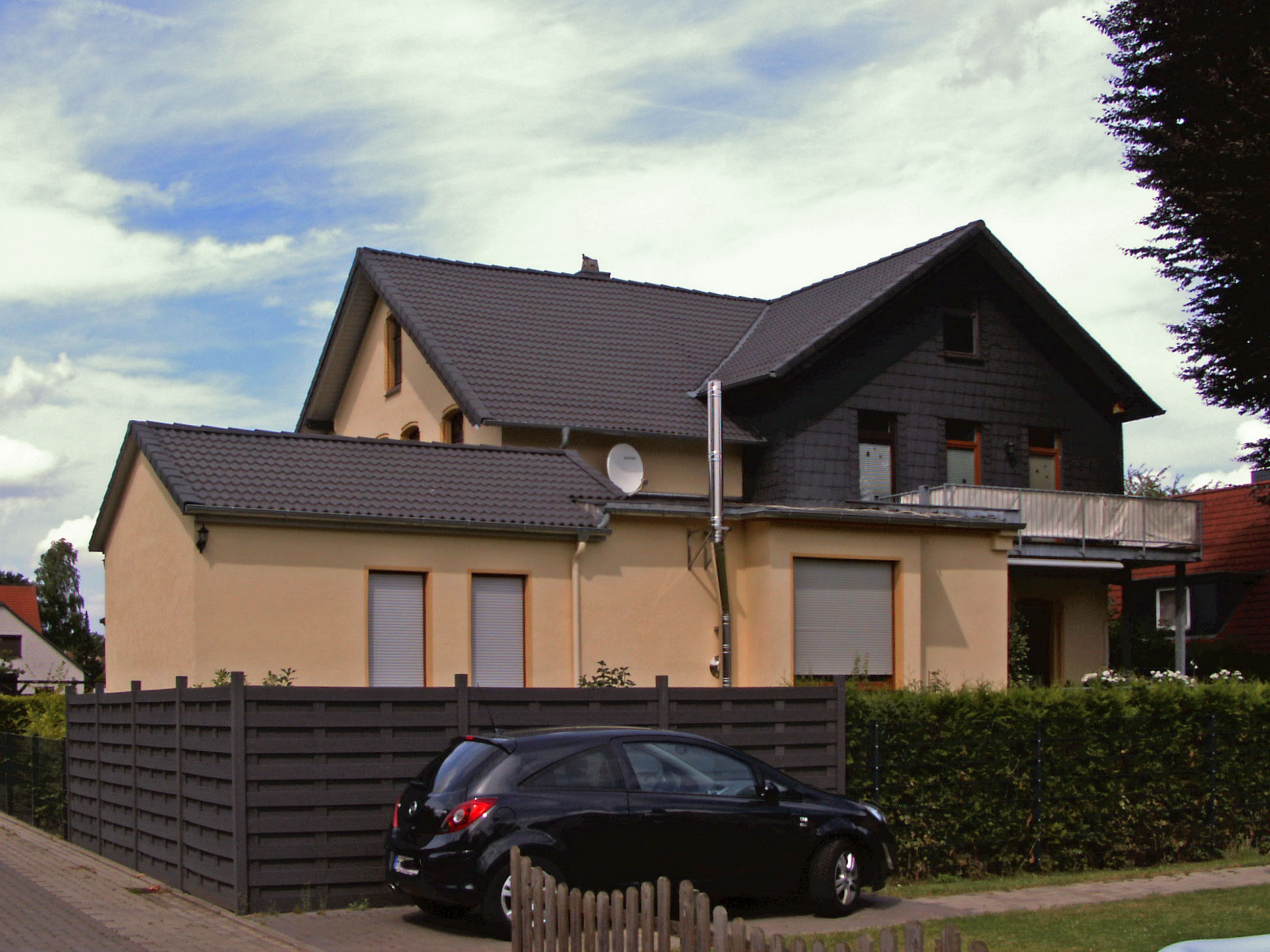 Ehemalige katholische Georgskapelle in Salzgitter-Thiede.